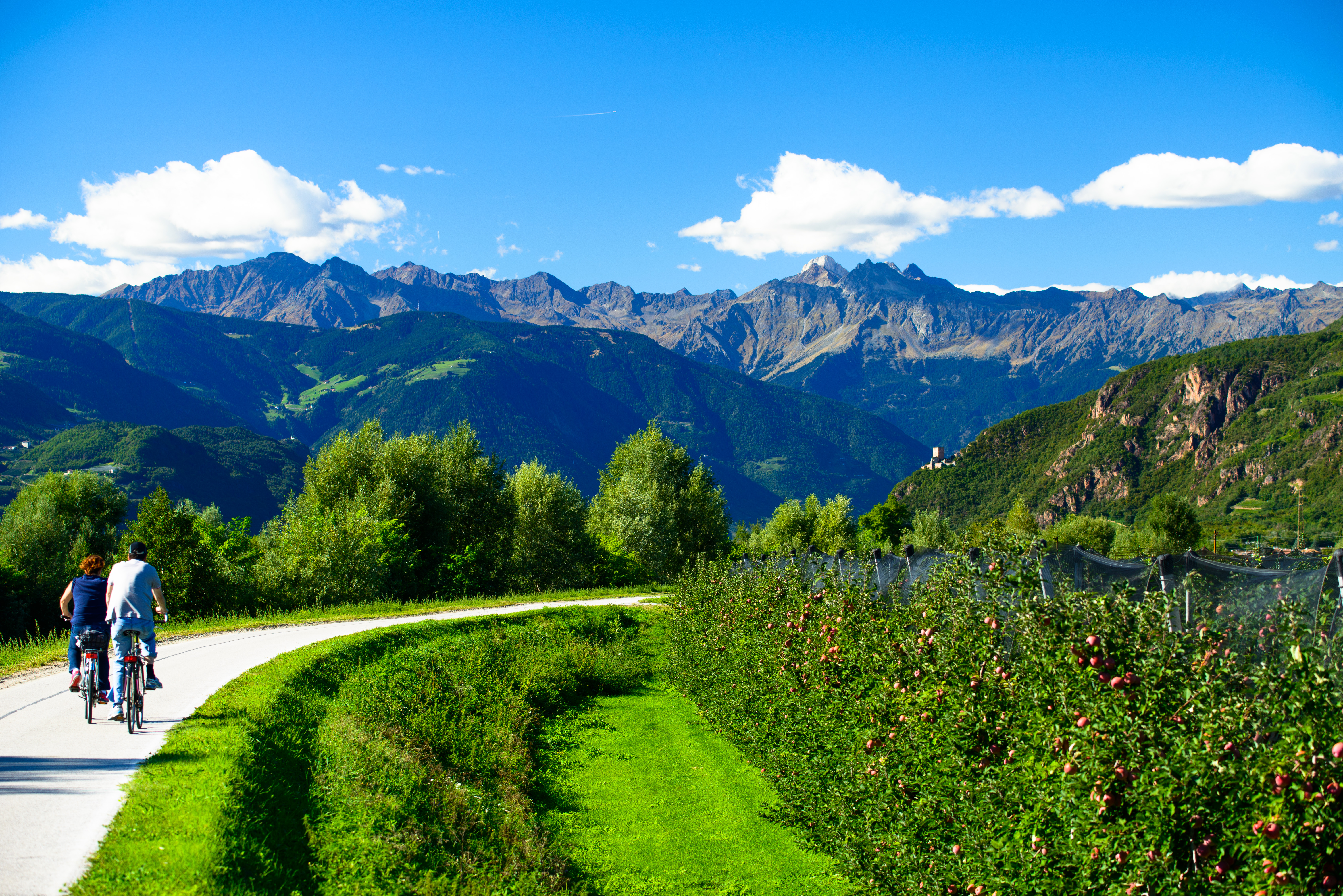 Via Claudia Augustea